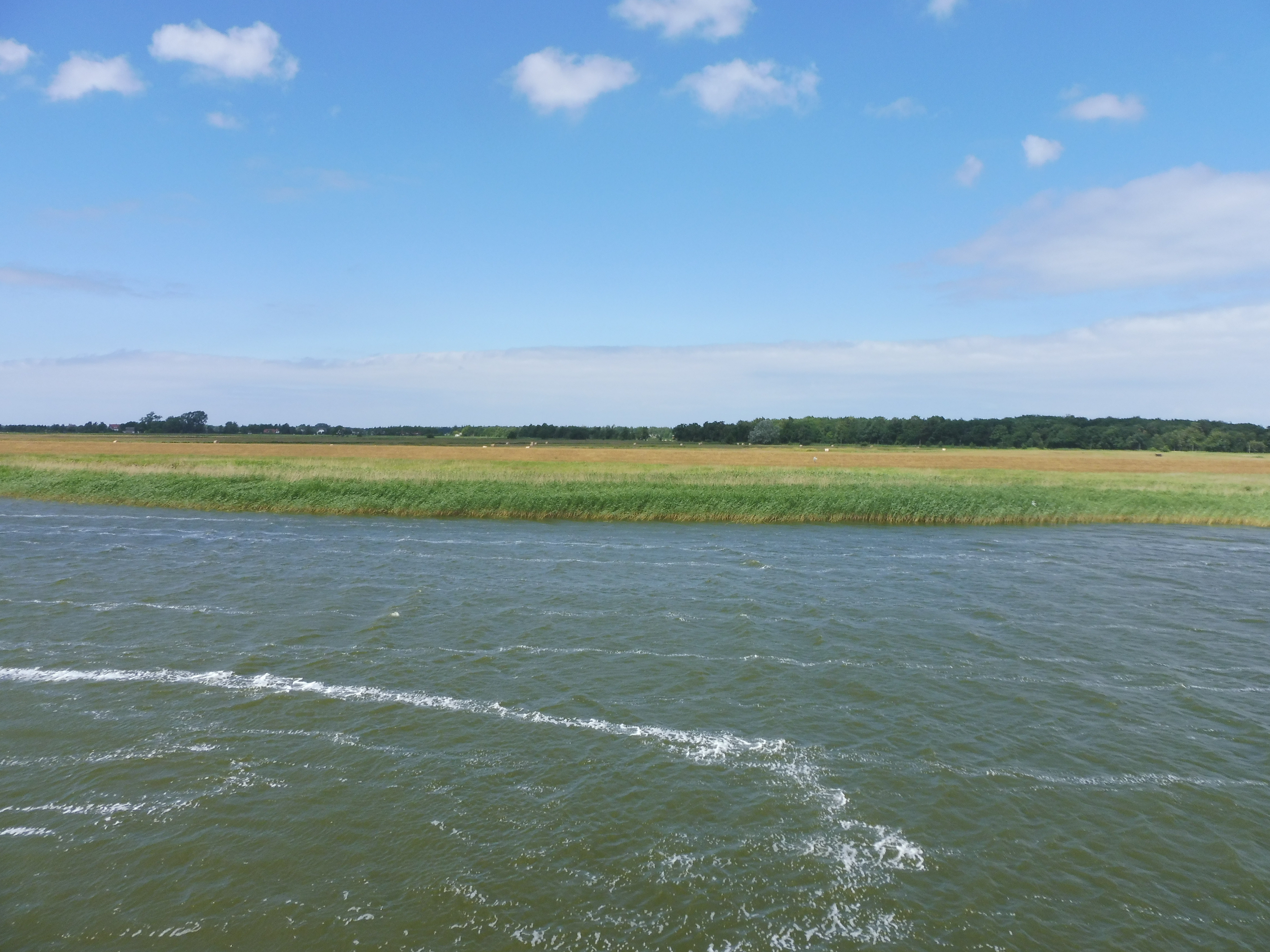 Sumpfwiesen am Südrand des Zingster Osterwaldes